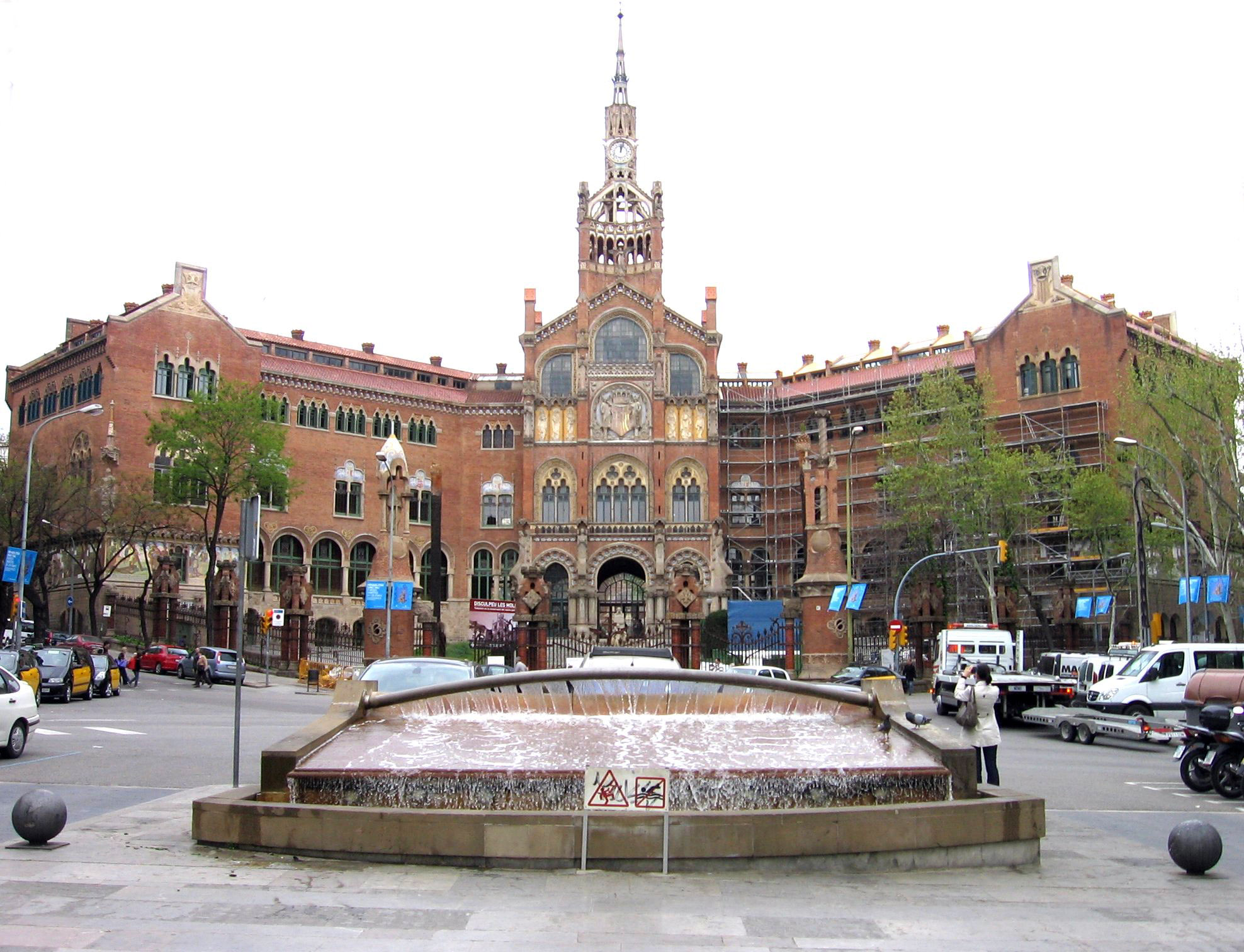 Fuente de la avenida Gaudí (1985), de Màrius Quintana.